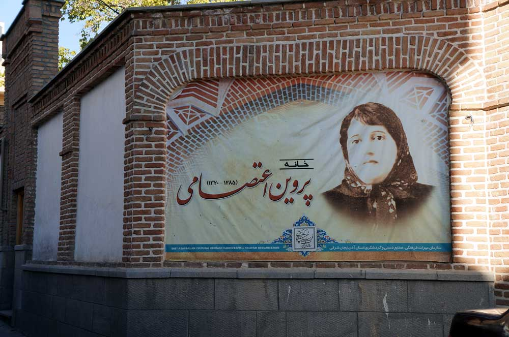 Tabriz, Iran